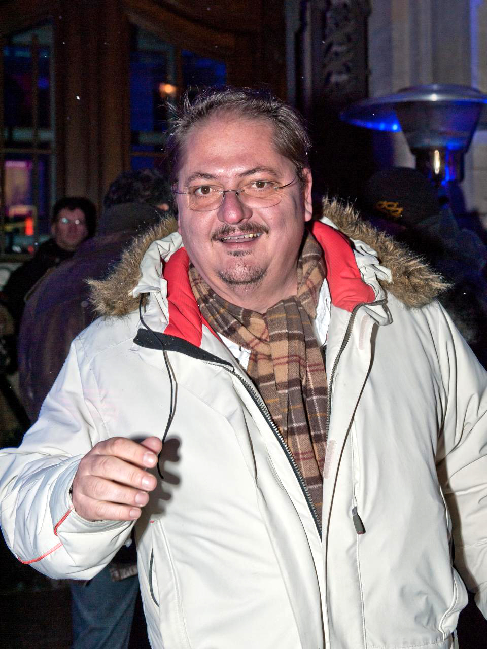 Jürgen Tarrach, German actor, Berlinale 2012, ARD Degeto Blue Hour Party